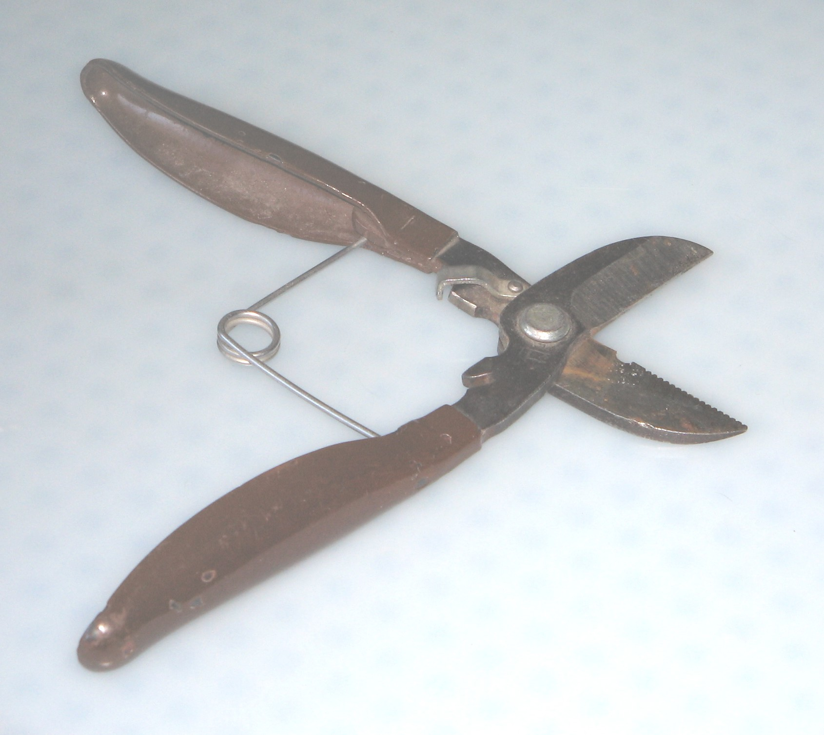 Tondilo por lado. La foto estis farita de mi mem.